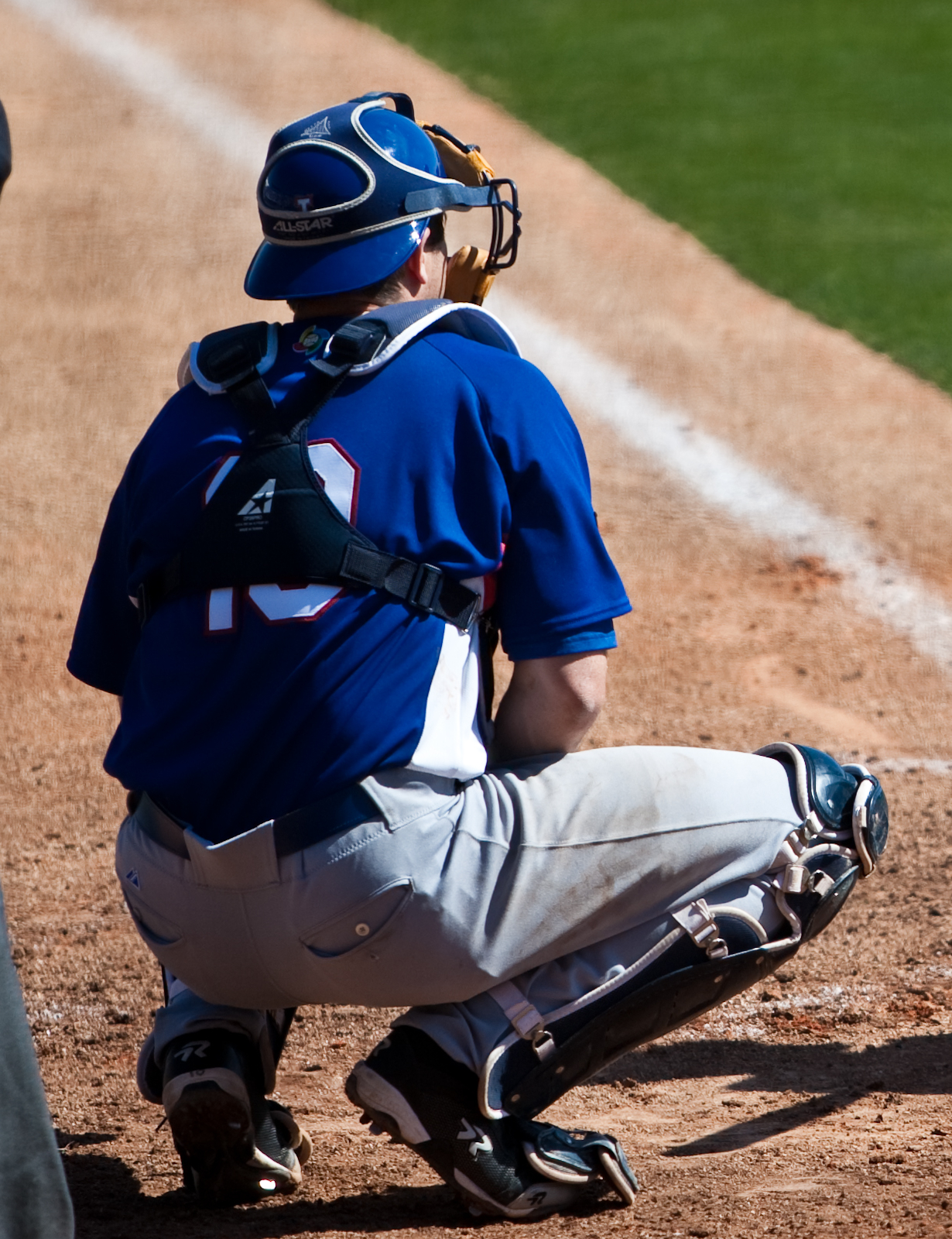 Vinny Rottino